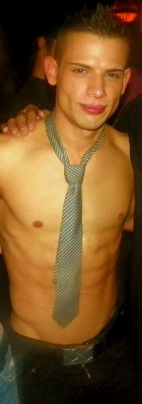 Brent Everett no SOBE em Houston